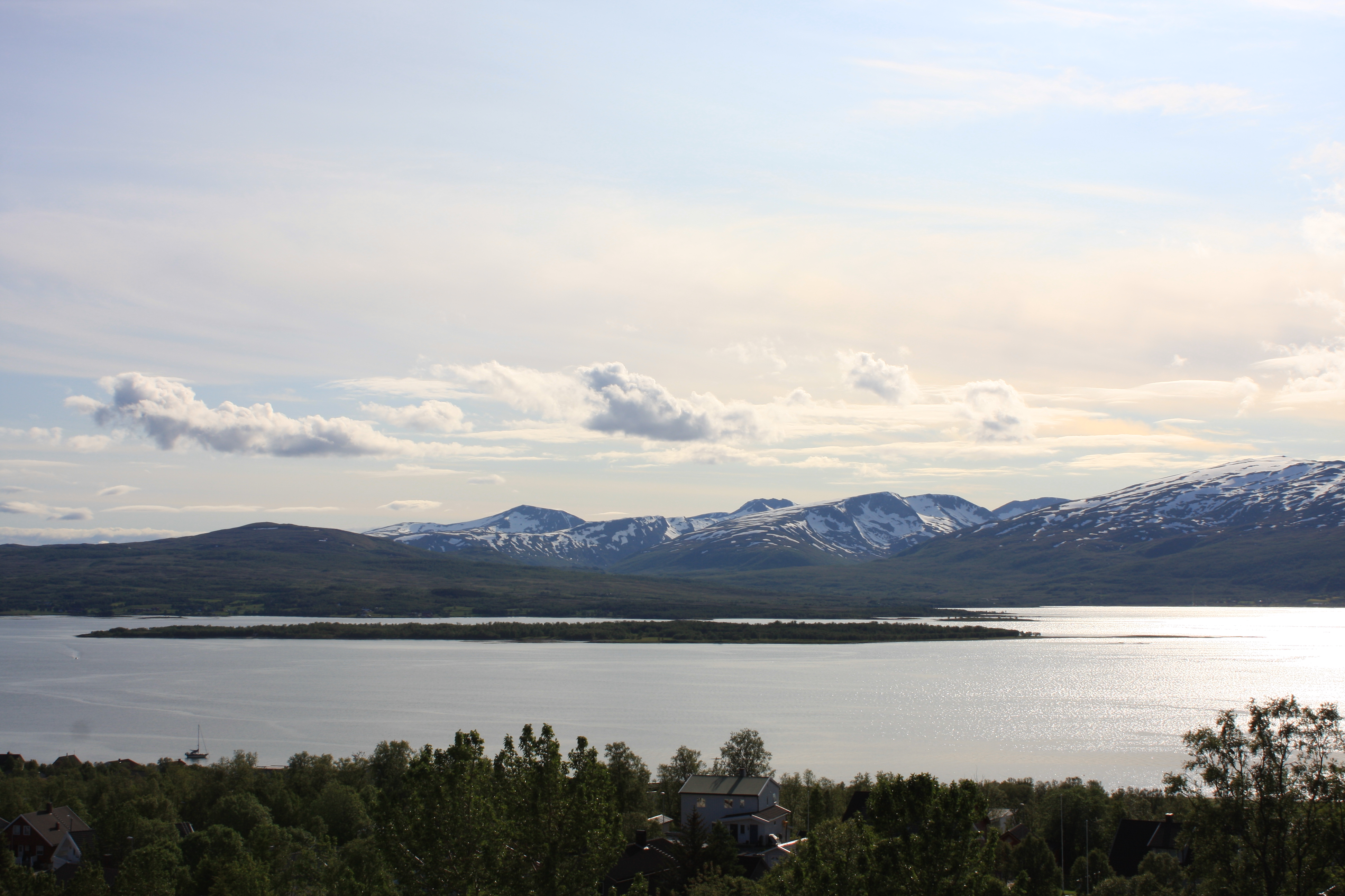 Fra Tromsø-området